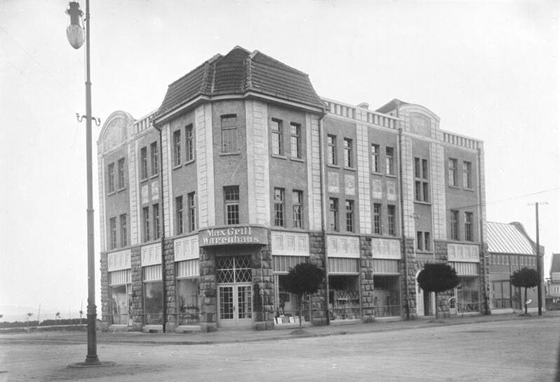 China, Tsingtau, Warenhaus M. Grill China, Tsingtau, Warenhaus M. Grill